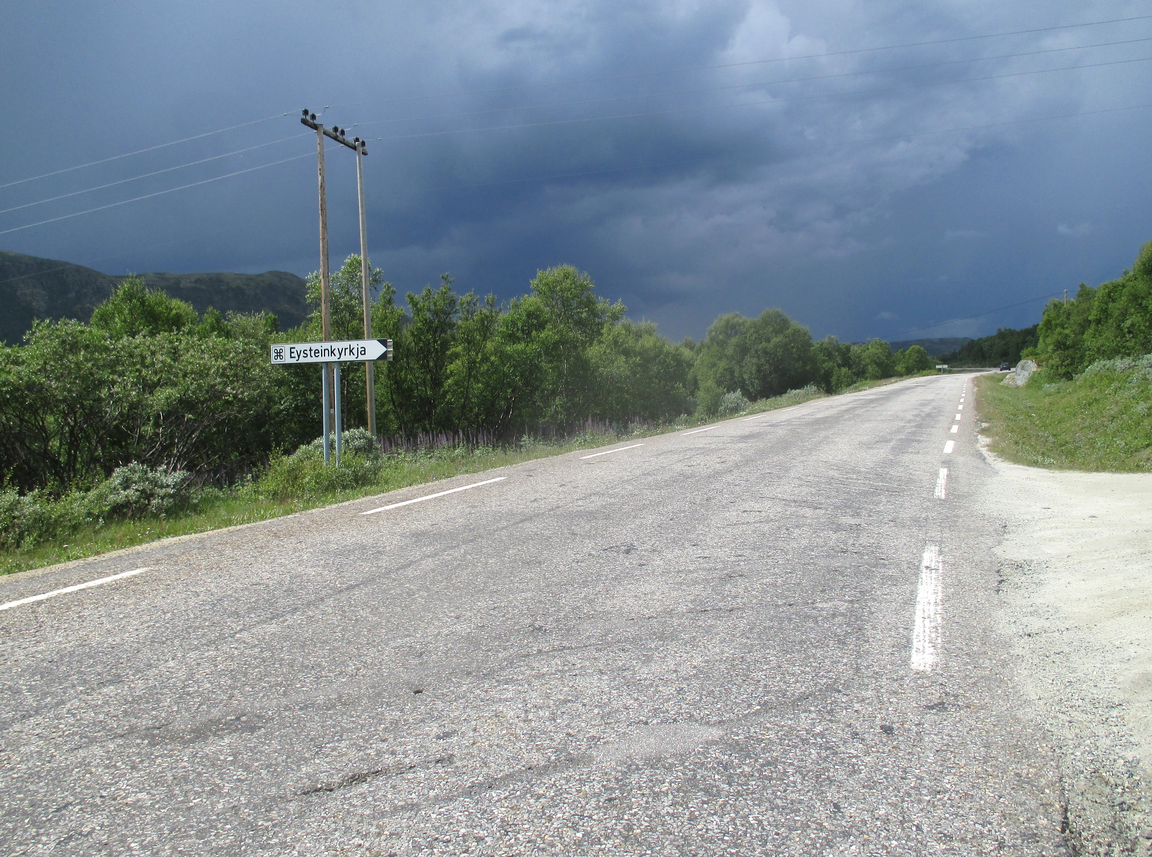 Primær fylkesvei 29 like ved Eysteinkirken på Hjerkinn